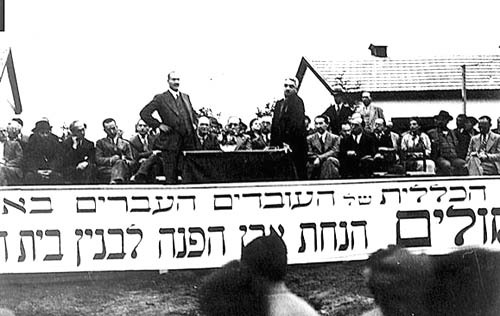 צילום מטקס הנחת אבן הפינה לבית החולים ע"ש בילינסון של שירותי בריאות כללית, שנת 1935